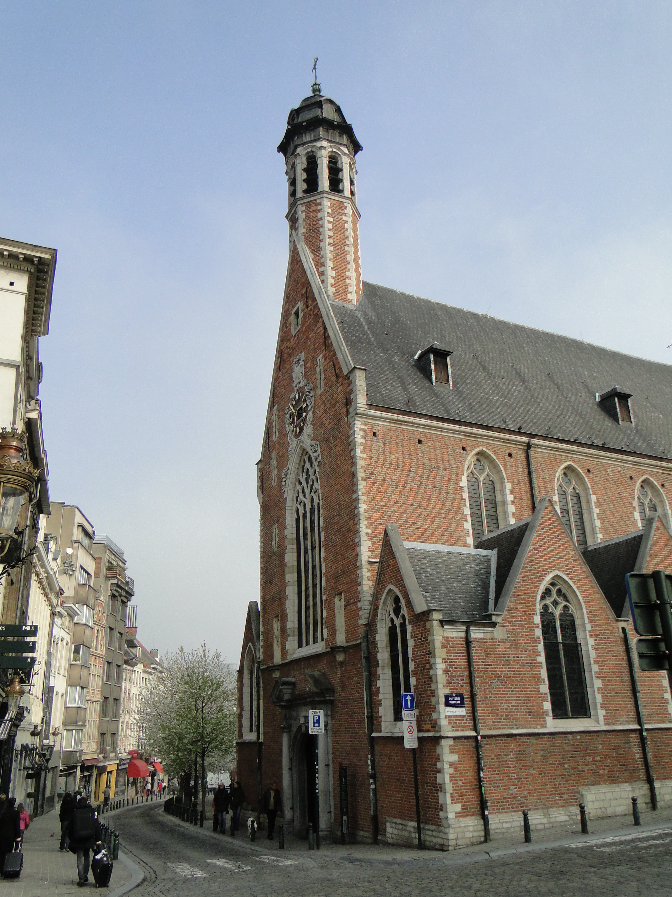 Brussel